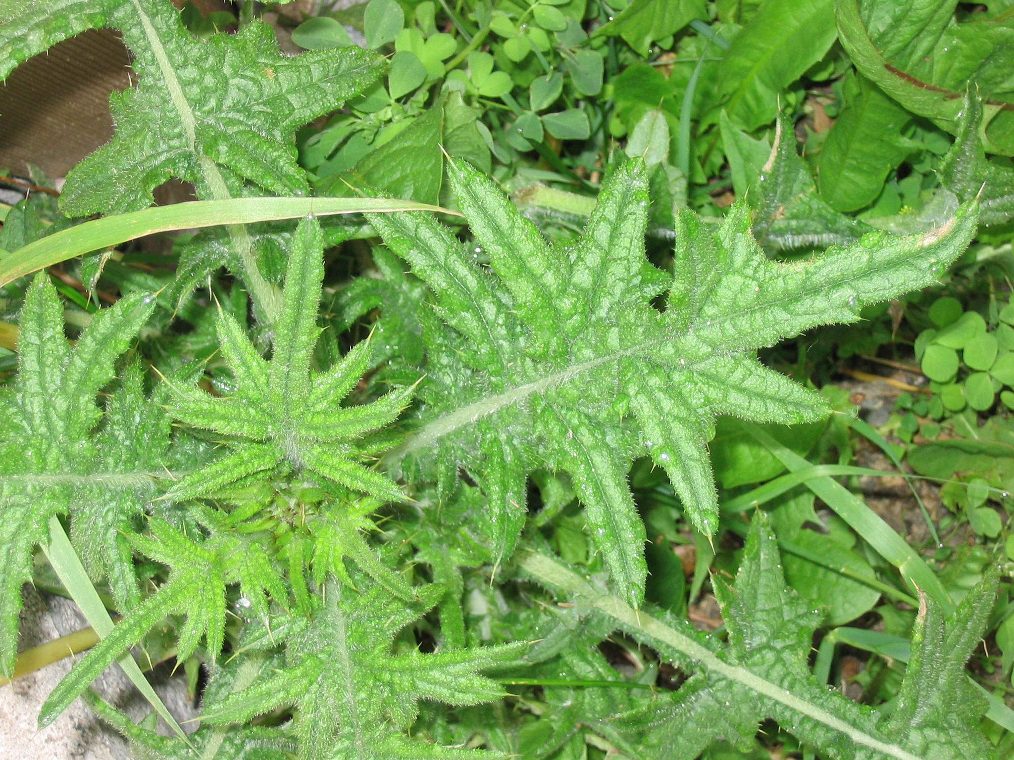 Cirsium_vulgare_2-eheep